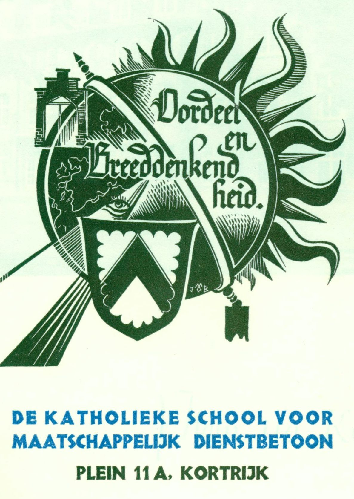 Vroege schoolaffiche